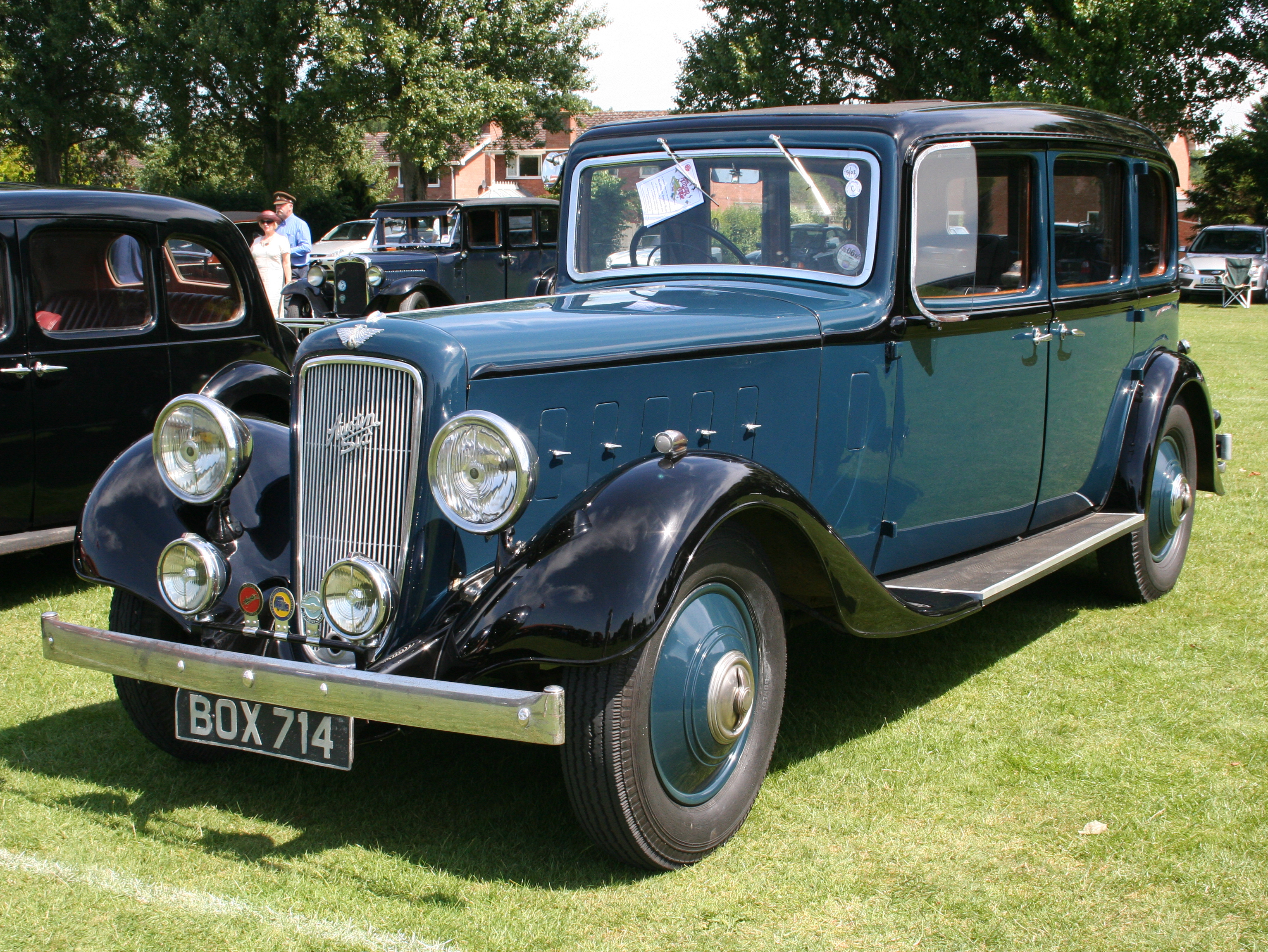 Austin 20 Mayfair saloon 1936